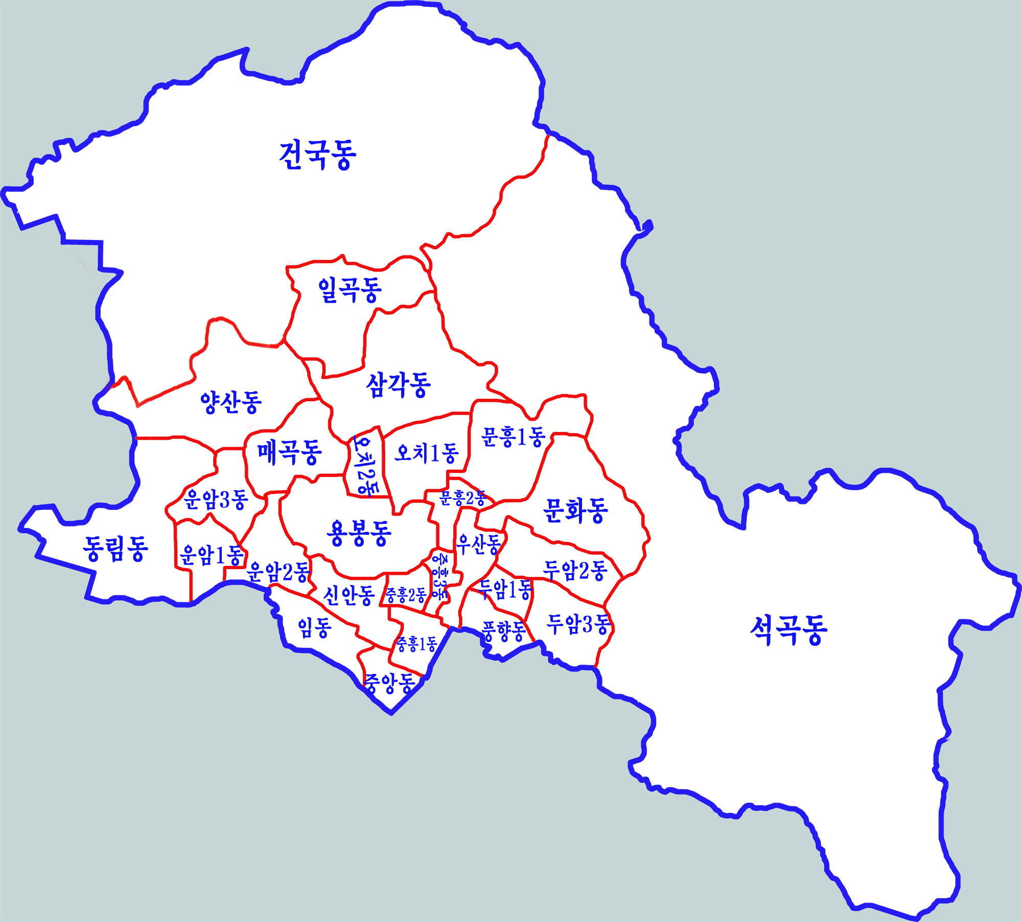 광주 북구행정구역도